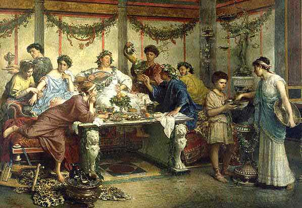 Immagine di un quadro di Roberto Bompiani "Il Parassita", 1875, già presente su it.wiki in formato ridotto Categoria:Immagini d'arte italiana